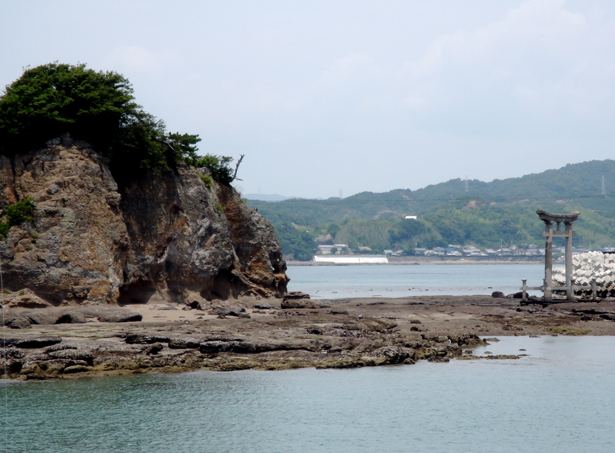 和歌山県田辺市天神崎